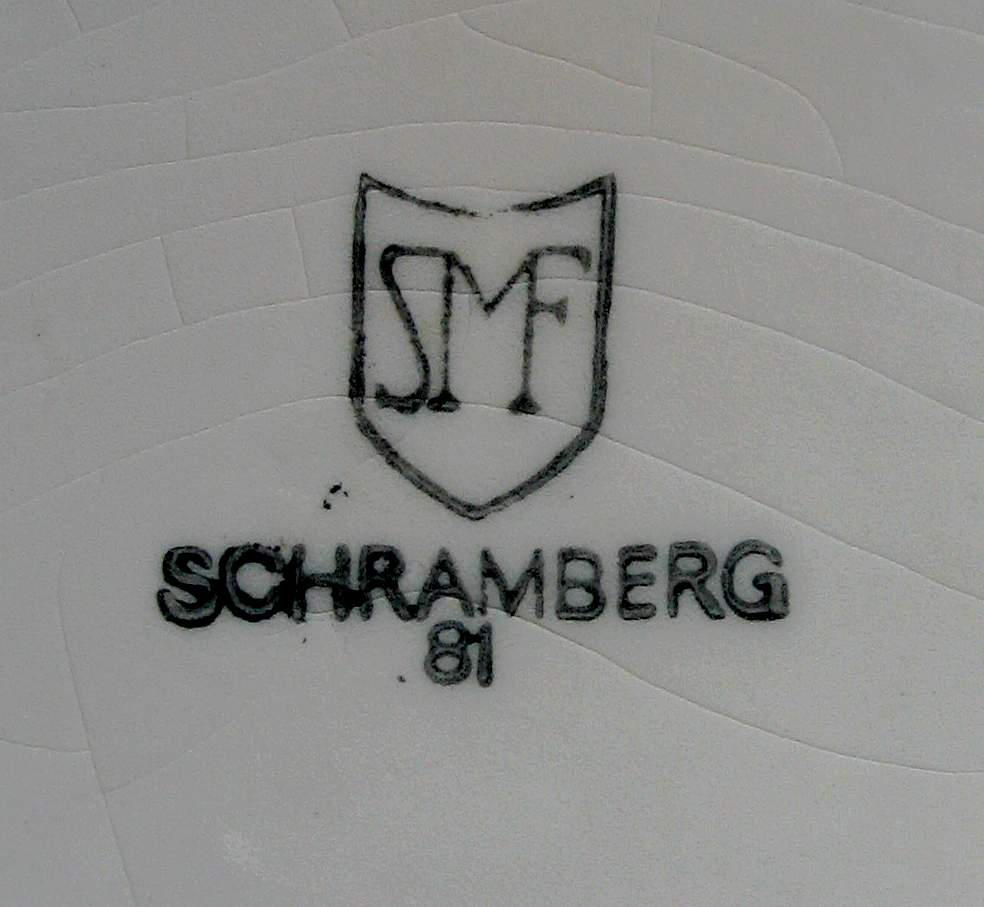 Signature, faïence, Schramberg, Allemagne